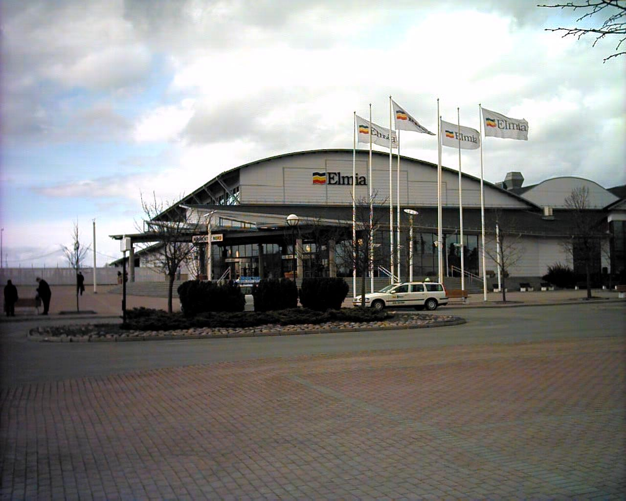 Elmia, norra entrén. Photo taken by User:Boivie in Jönköping 7 April 2006